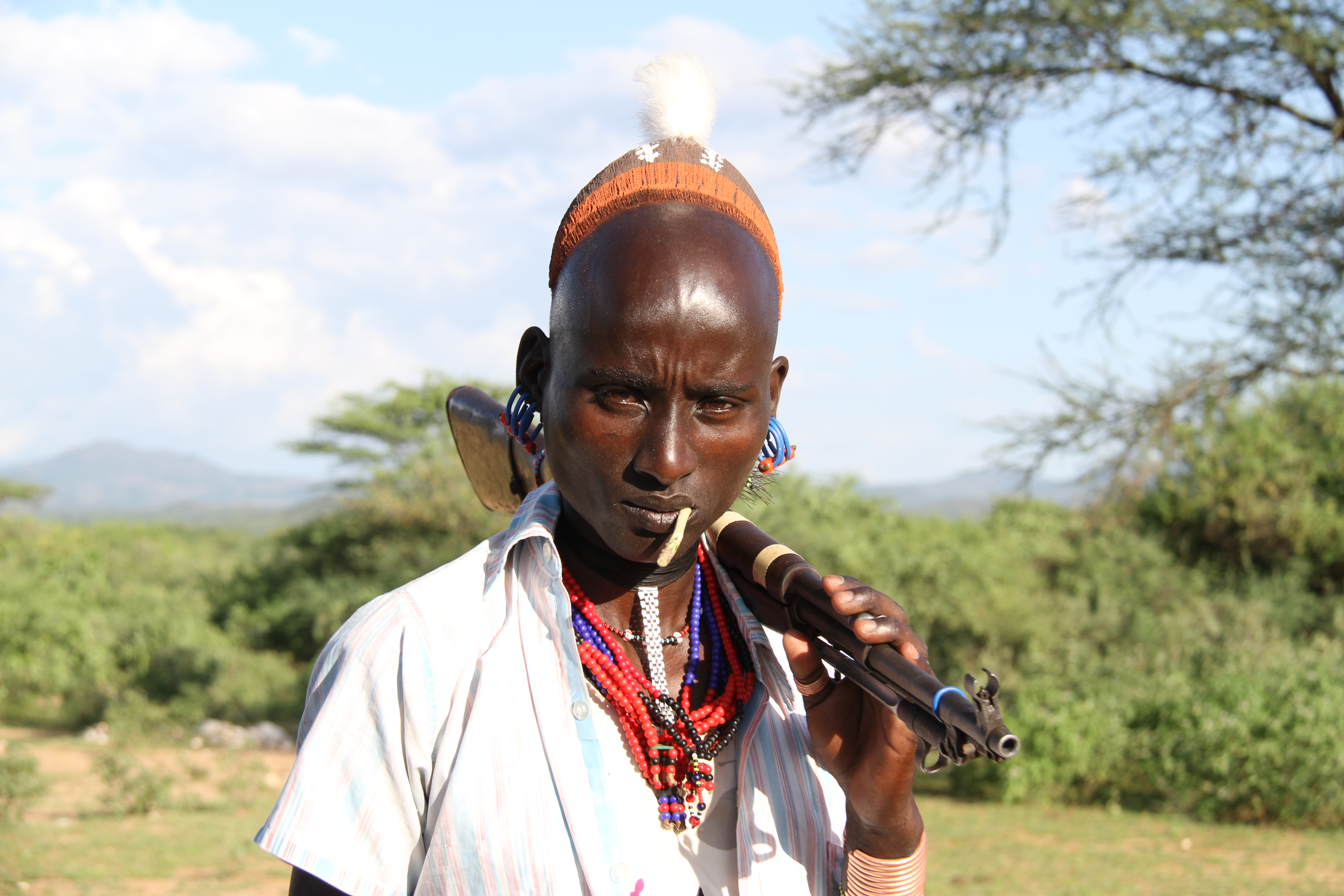 Ethiopie, jeune homme Hamar